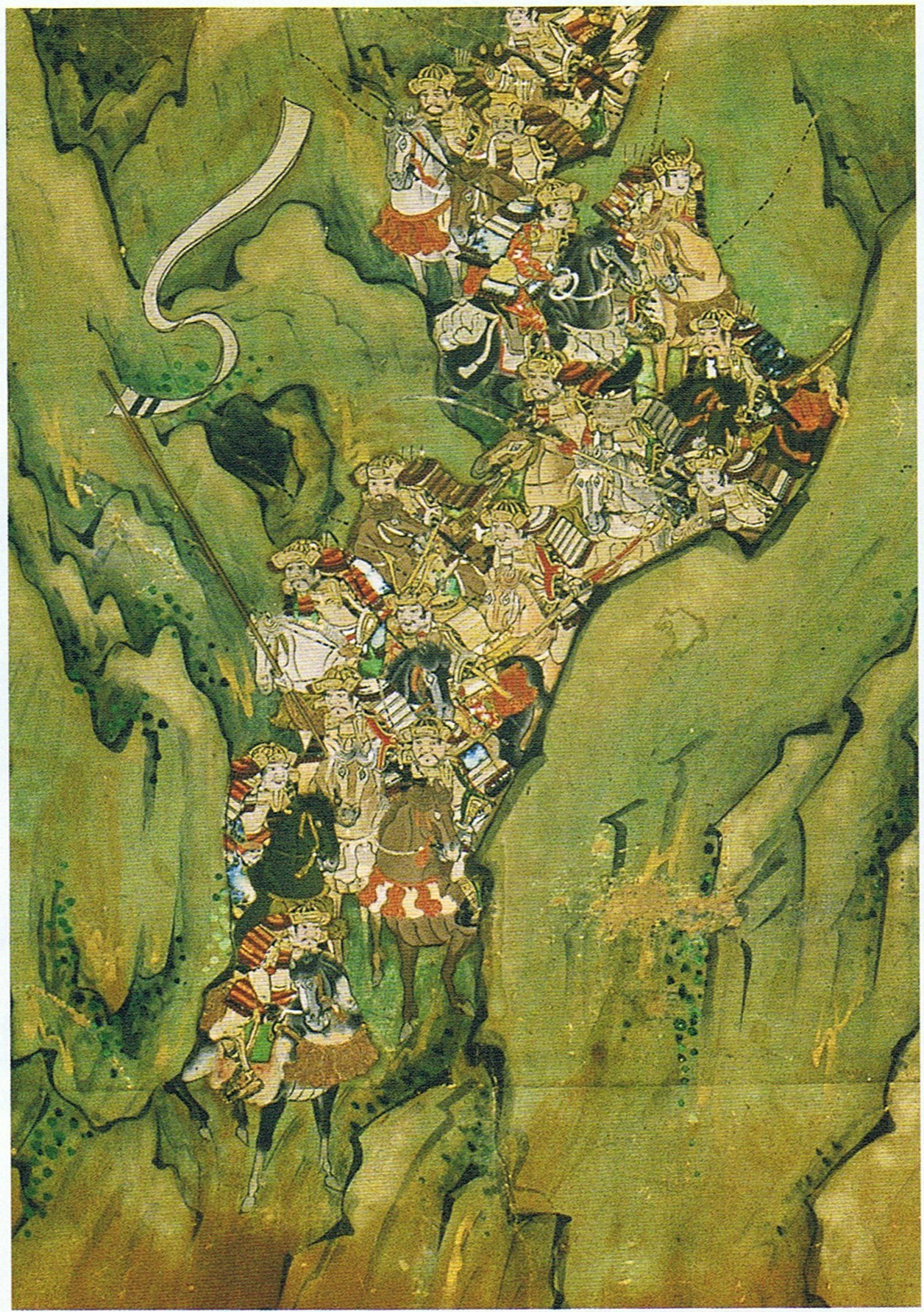 『源平合図屏風』「一ノ谷」